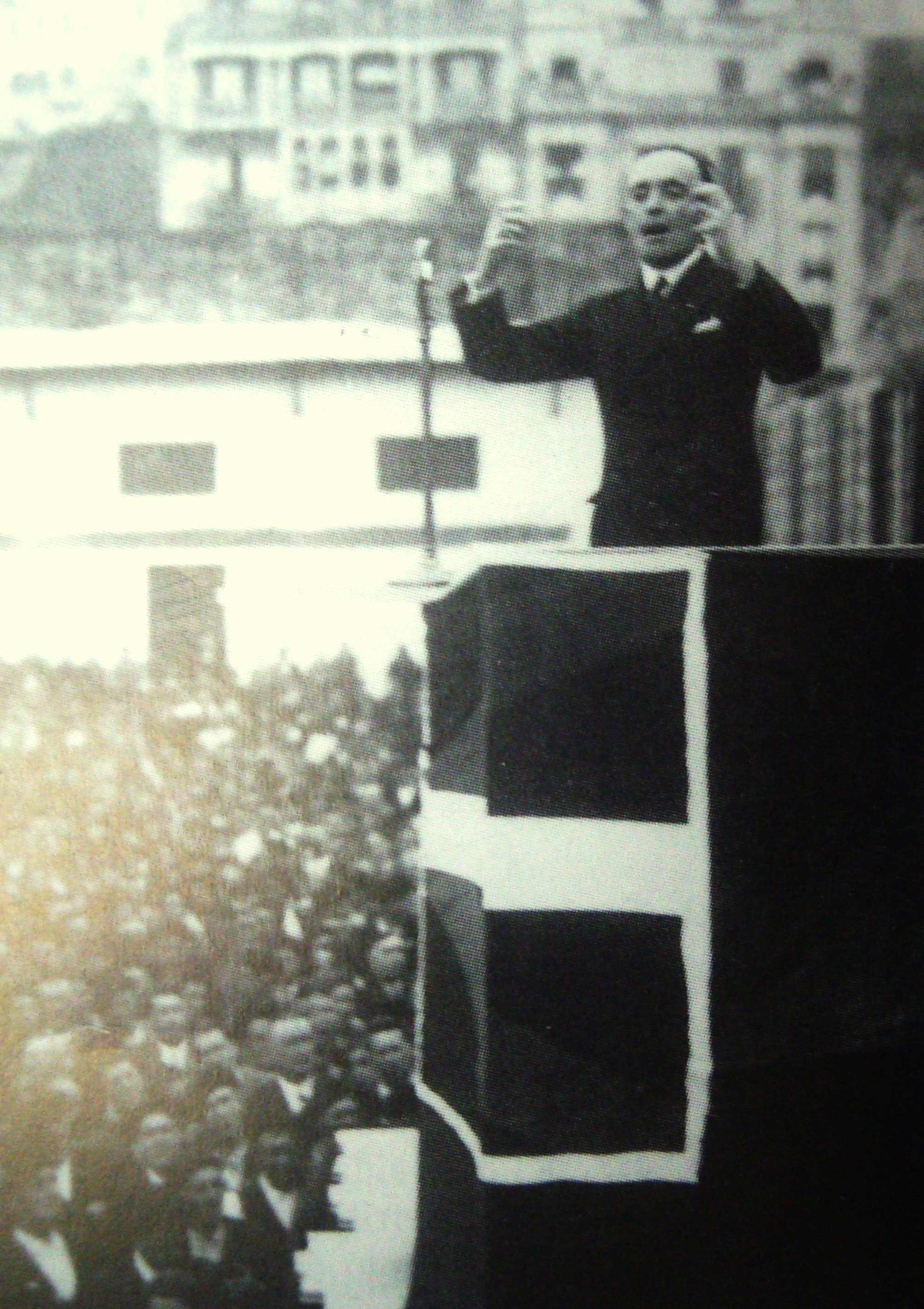 Hernandorena Maitea Pilotalekuan - Donostia - 1933ko Aberri Egunean